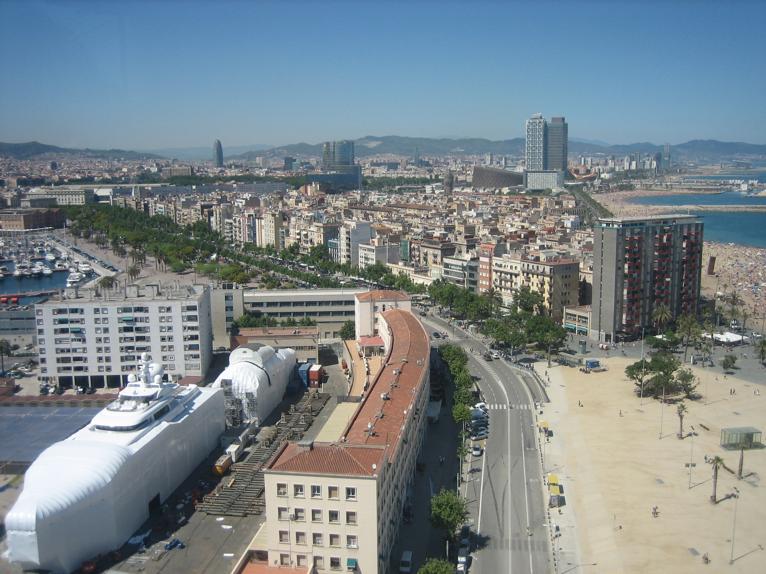 Vista general del Barrio de la Barceloneta de Barcelona, desde la Torre de Sant Sebastià del Transbordador Aéreo del Puerto.